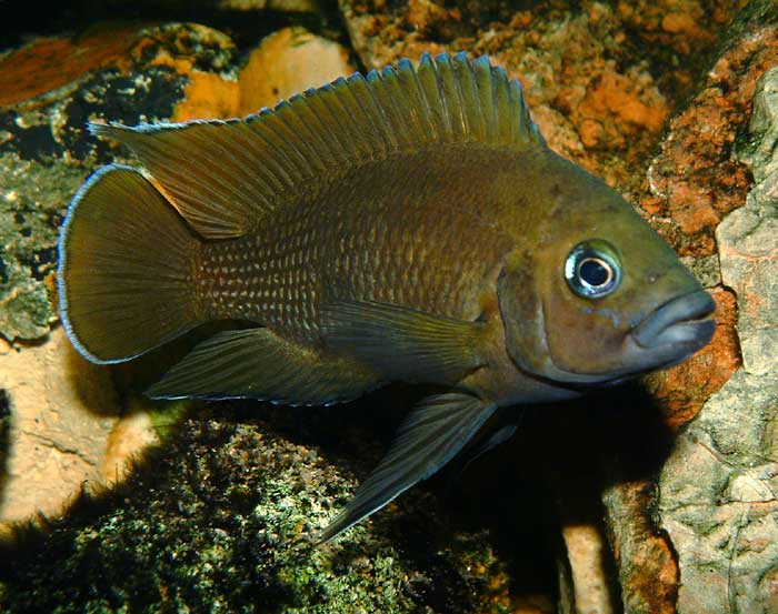 Variabilichromis adulte en aquarium.